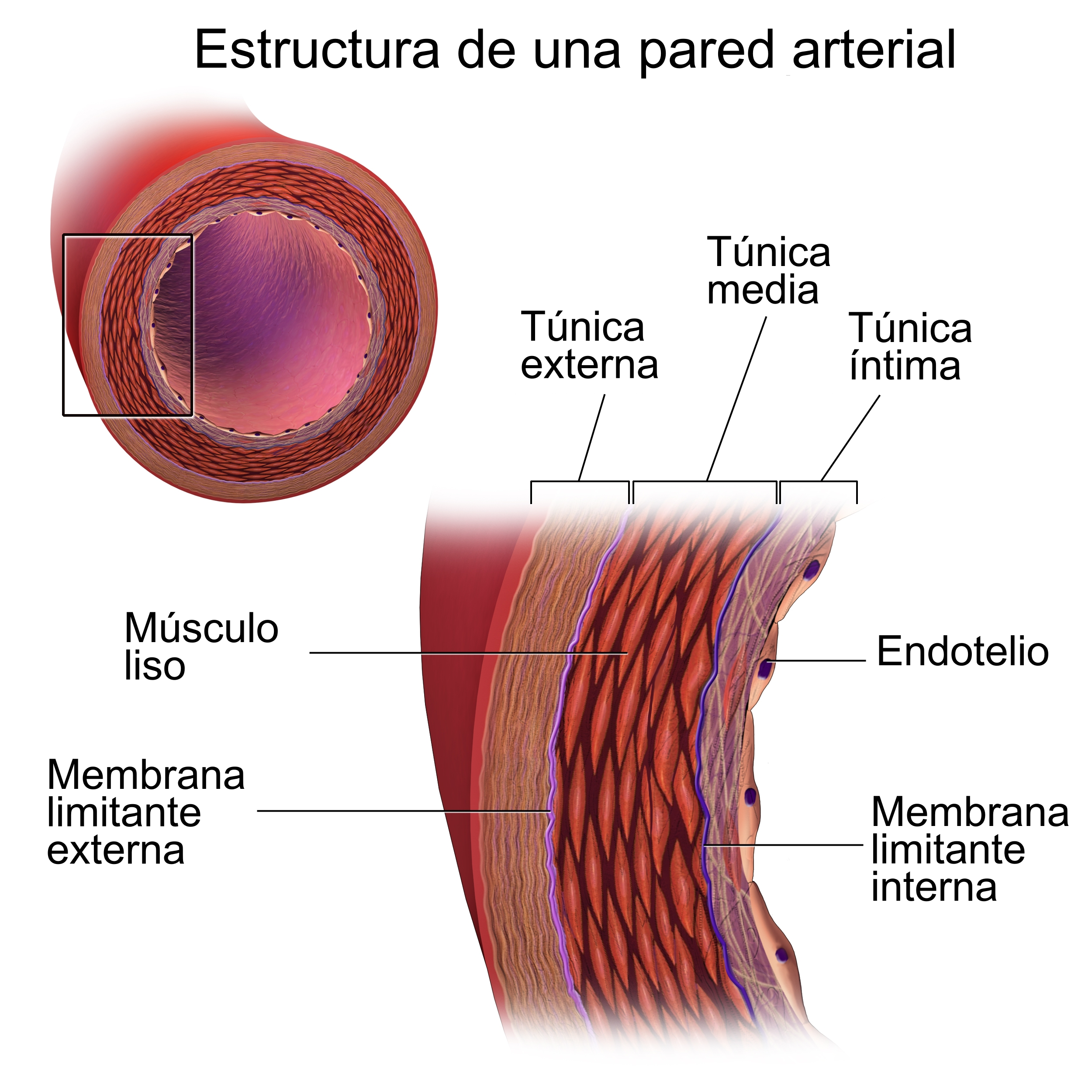 Dibujo en el que se representa la pared de una arteria. Pueden observarse las principales capas que la componen.